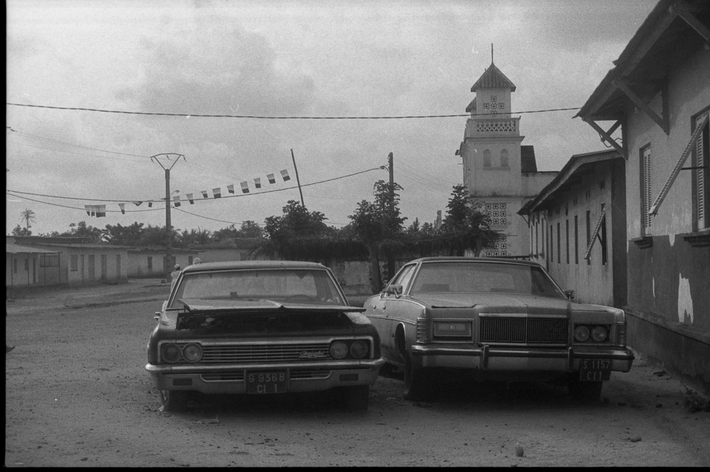 Voitures américaines en Côte d'ivoire dans les années 90, abandonnées, témoignant d'une prospérité passée.